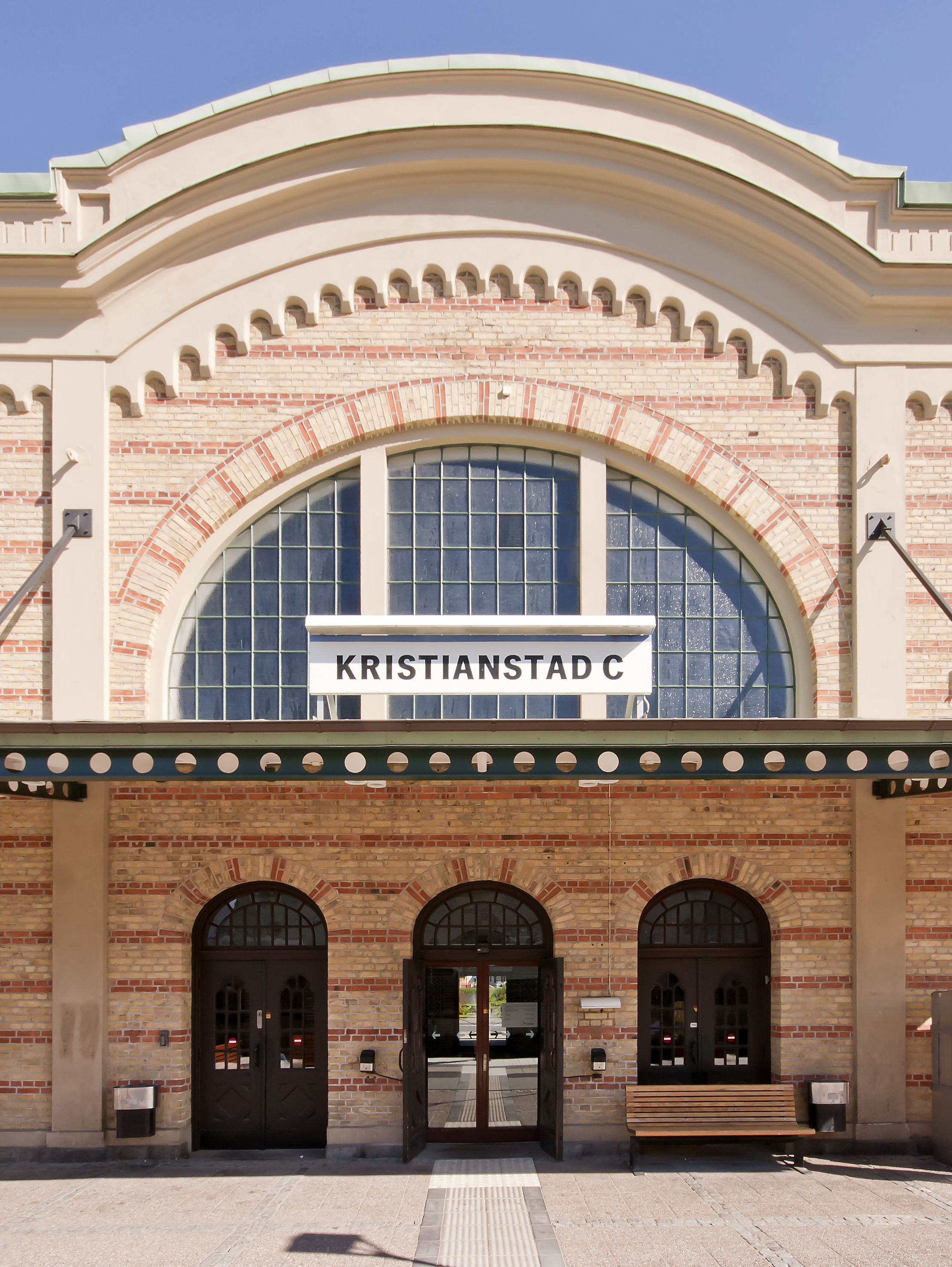 Entrén från spårområdet till vänthallen på Kristianstads centralstation.